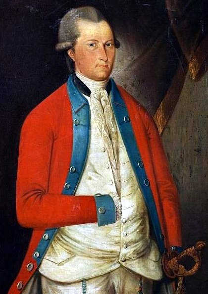 Casimir Wilhelm von Scholten (1752-1810); dänischer Generalmajor und Gouverneur von Saint Thomas und Saint John (Dänisch-Westindien)